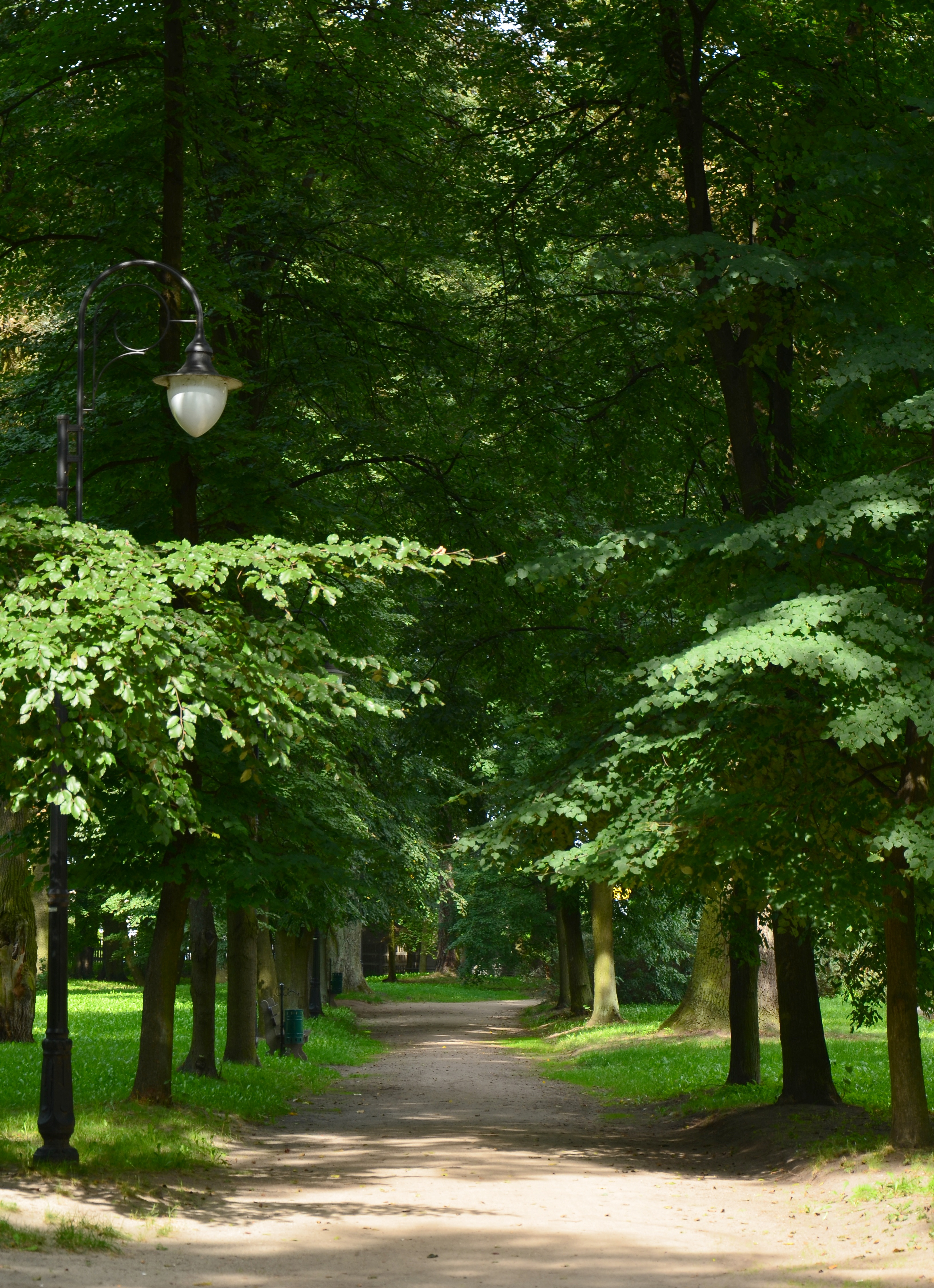 Skrwilno, park dworski, 2 poł. XIX